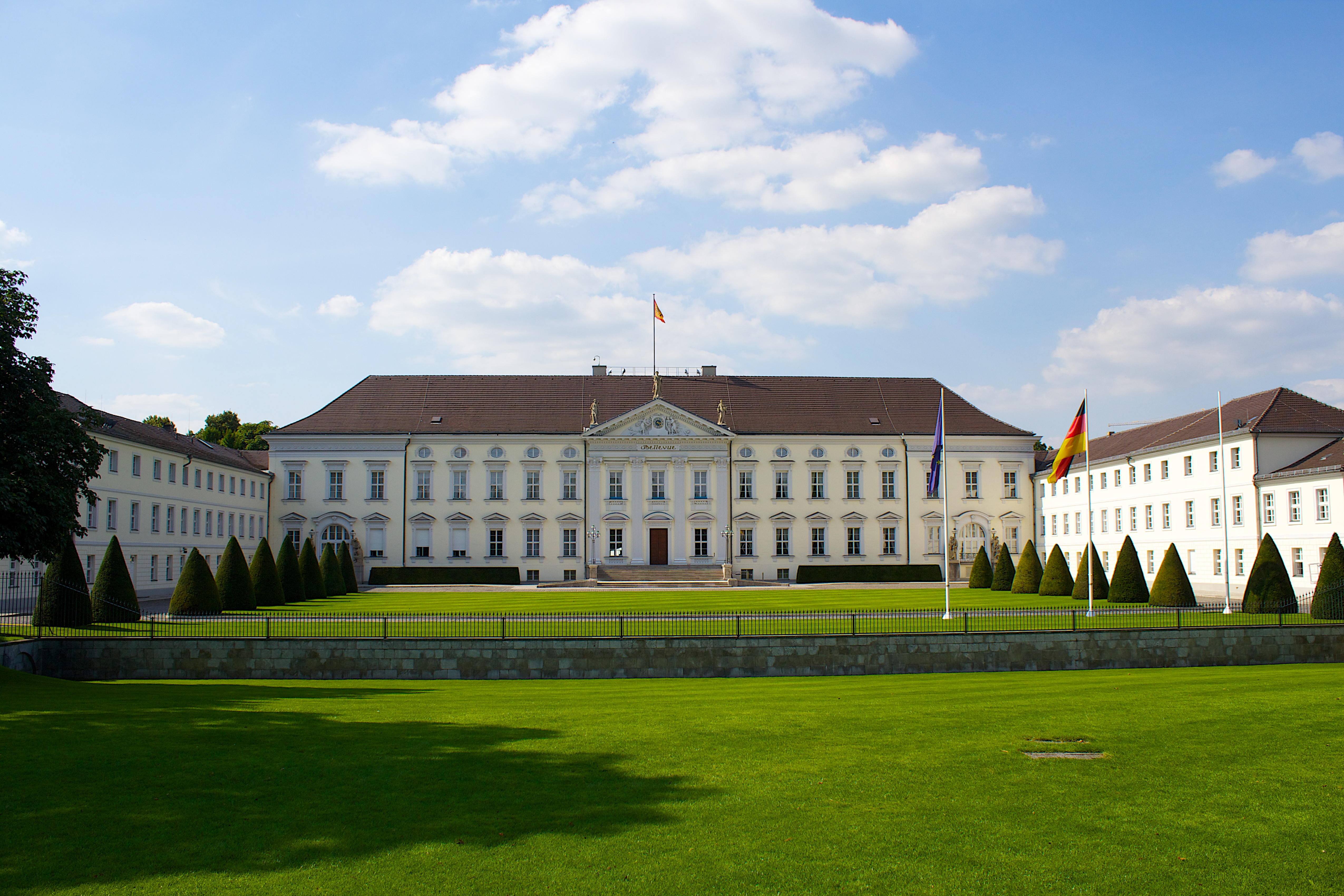 Berlin